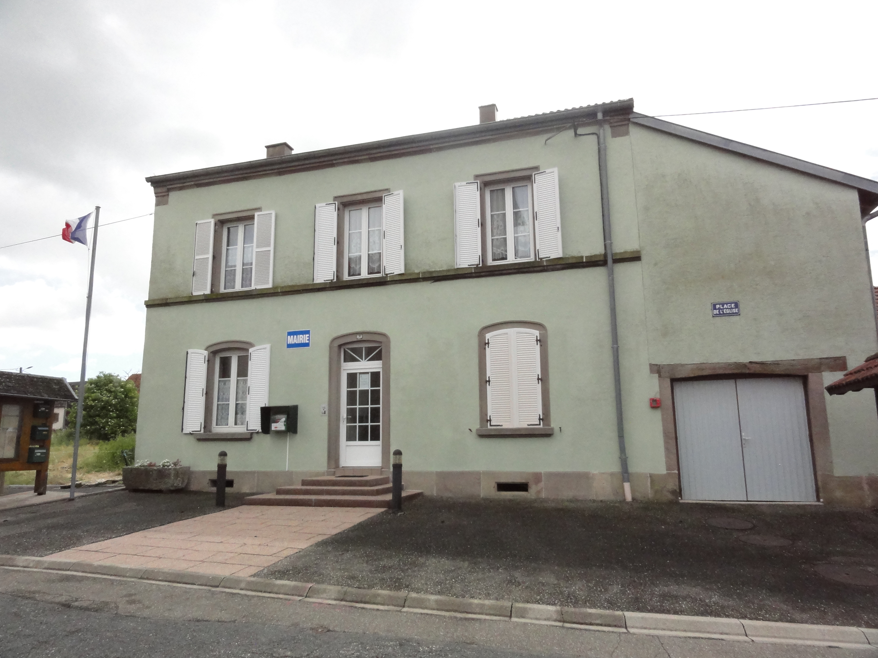 Fleisheim (Moselle) mairie